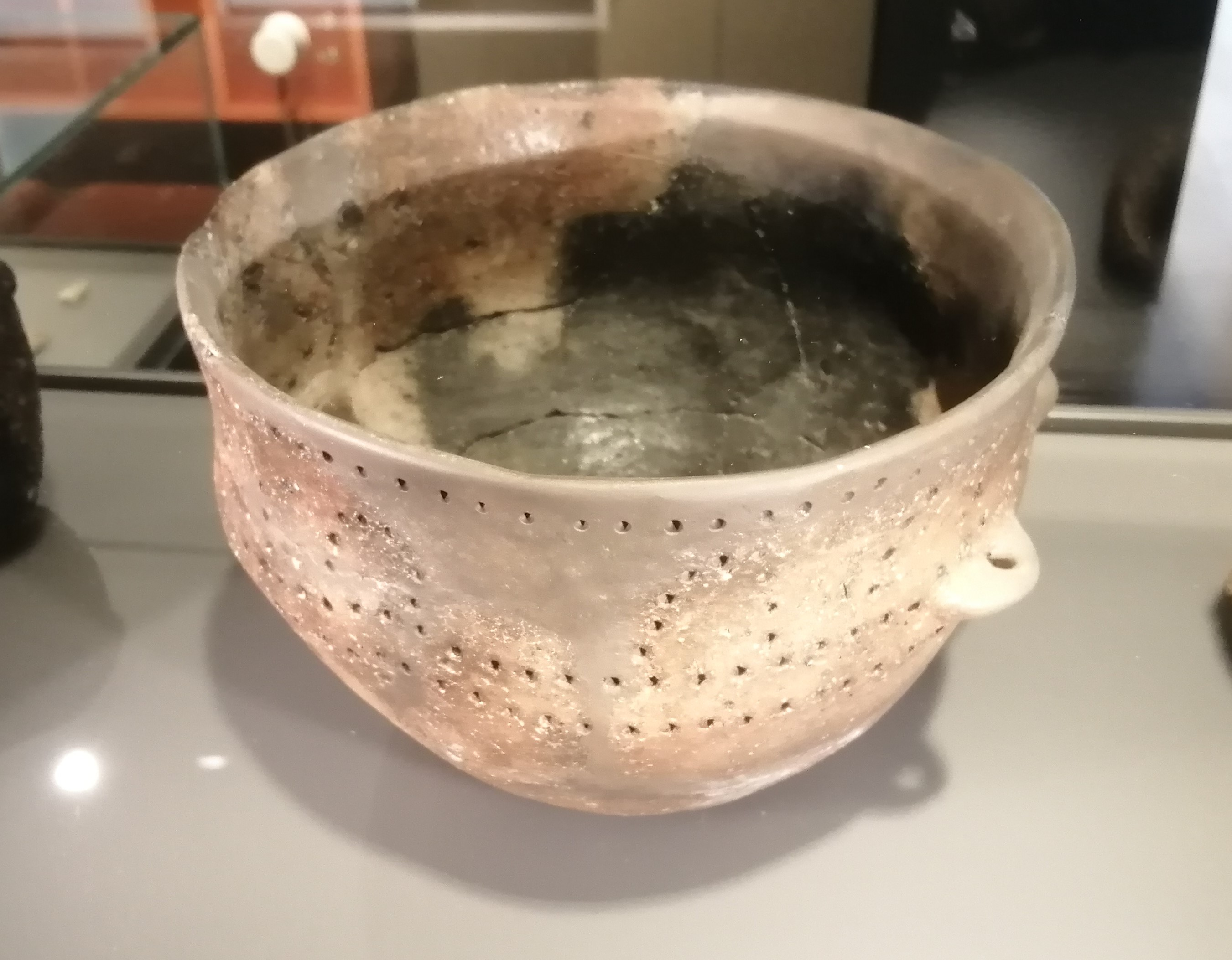 Objekt im Museum Burghalde Lenzburg Beschreibung: Mit Einstichen verzierte Keramikgefässe sind in der Jungsteinzeit eher selten. Vieleicht weist ihre Verzierung auf eine besondere Verwendung oder einen bestimmten Inhalt hin. Material: Keramik Fundstelle: Meisterschwanden, Erlenhölzli Datierung: 4000-3400 v. Chr.